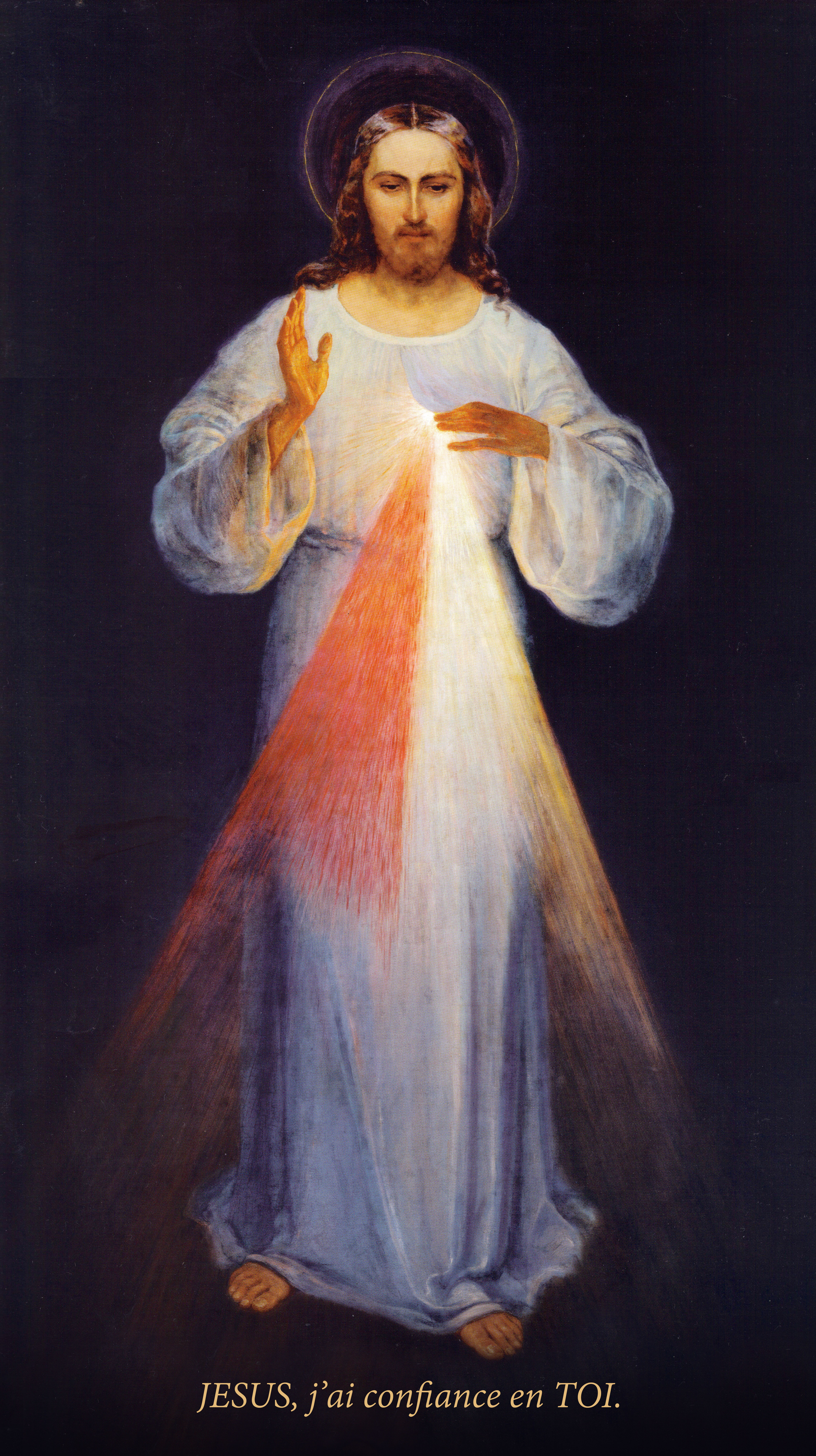 Véritable tableau de Jésus Miséricordieux (par Eugeniusz Kazimirowski en 1934). Le seul qui ait été peint sous les indications de Sainte Faustine et béni par son confesseur l'Abbé Sopoćko contrairement au tableau d'Adolf Hyła peint en 1943 après la mort de Sainte Faustine et pourtant plus connu.